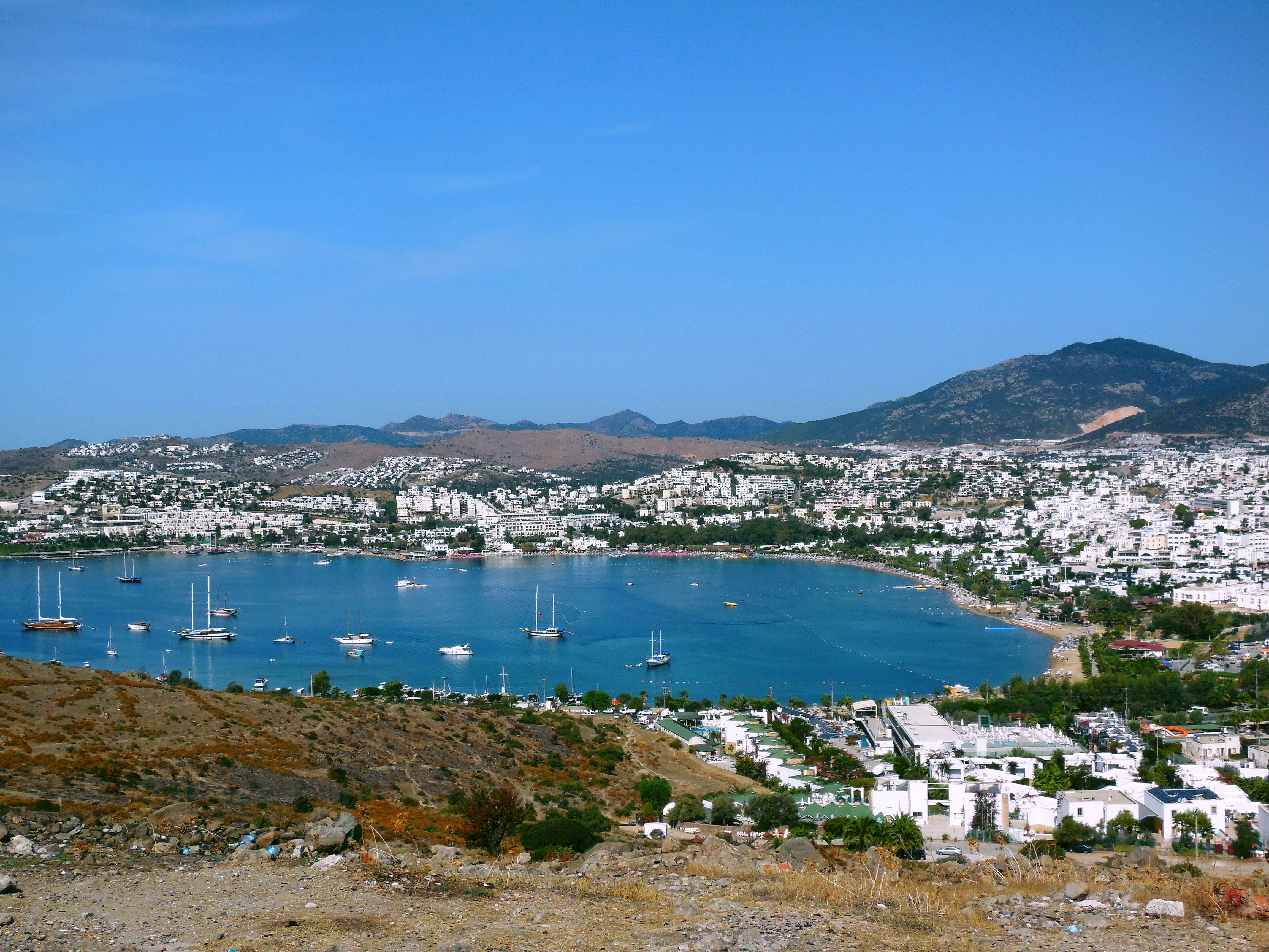 Bodrum